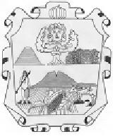 Escudo de Armas de Ocampo Tamaulipas